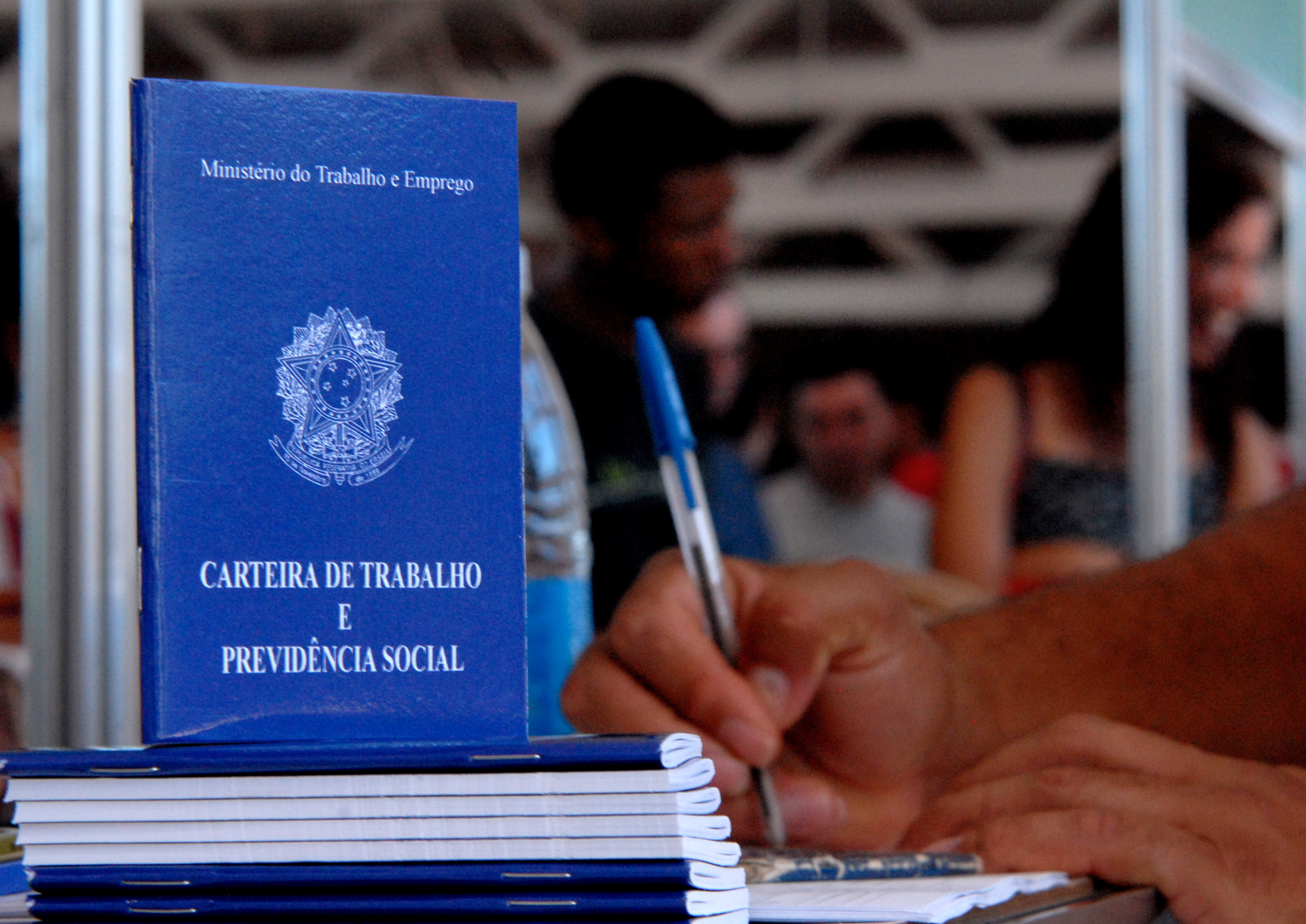 Brasília - A Agência do Trabalhador, no Distrito Federal, distribui carteiras para marcar o 1º de Maio, Dia do Trabalho, e incentivar empreendedores da região a gerar empregos.